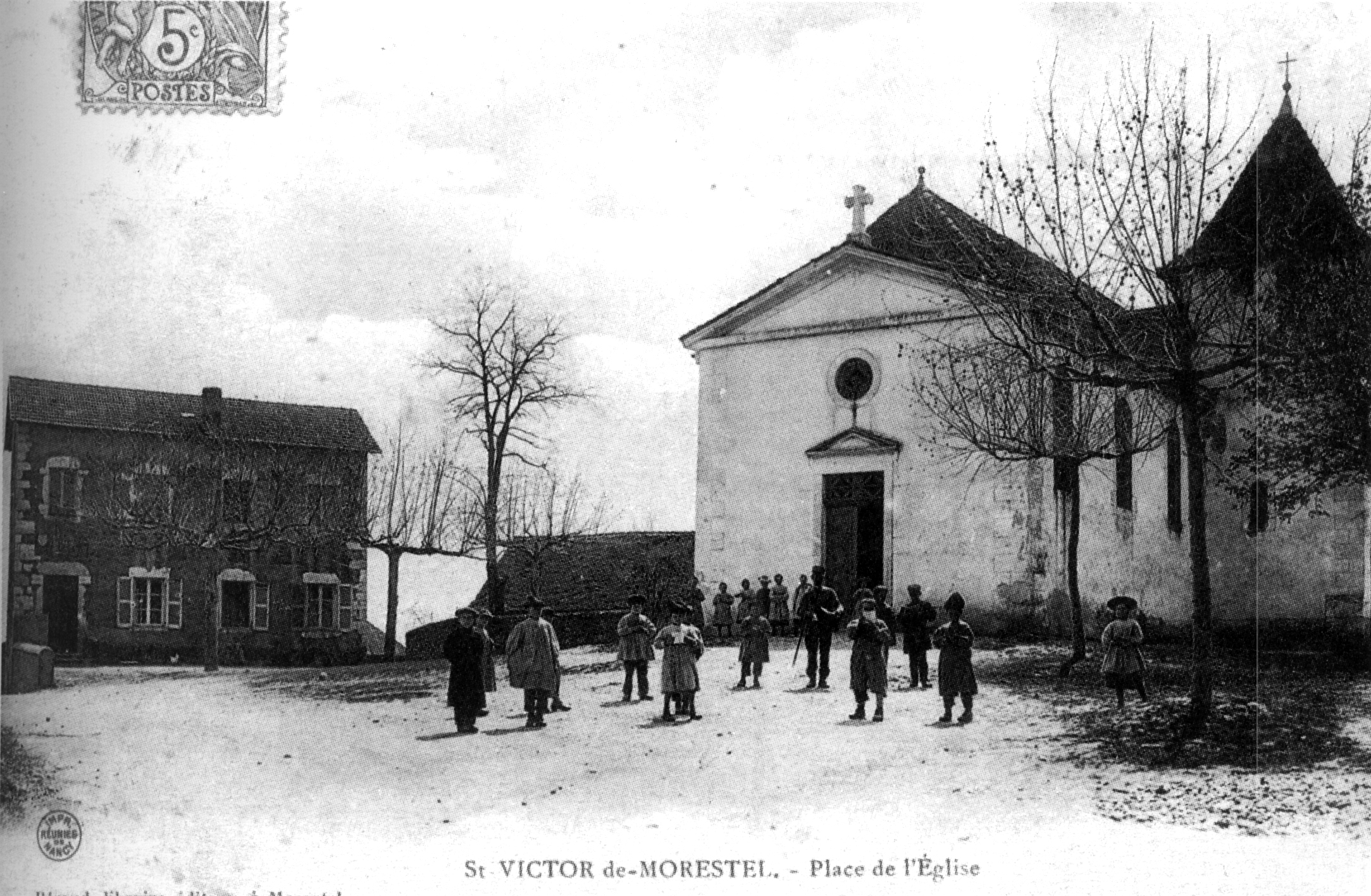 Saint-Victor-de-Morestel, place de l'église, en 1905